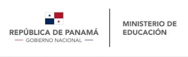 Logo del Ministerio de Educación de Panamá